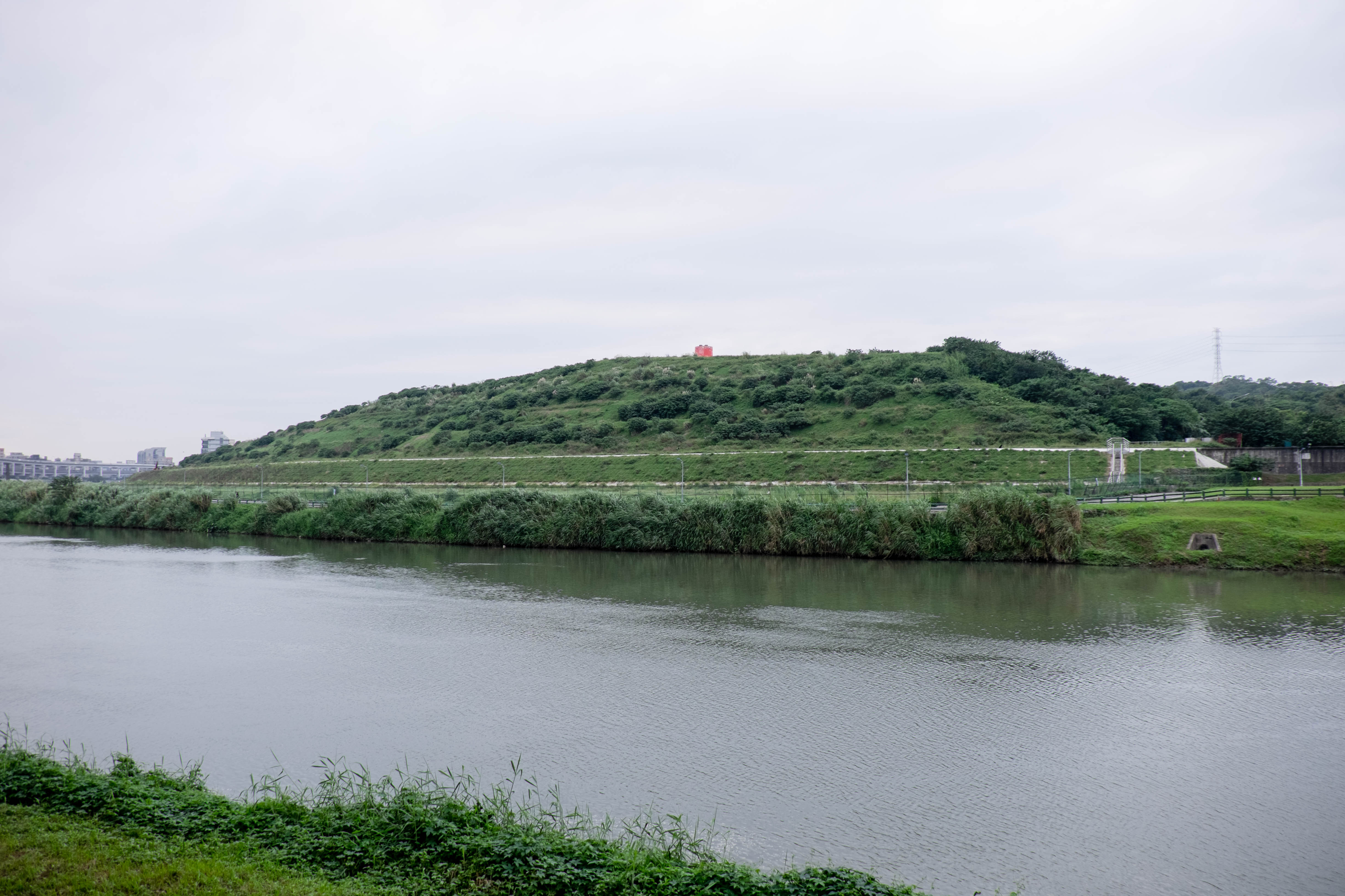 中文（台灣）: 從南湖左岸河濱公園疏散道路北望南湖右岸河濱公園與原葫洲里垃圾掩埋場（內湖垃圾山）。